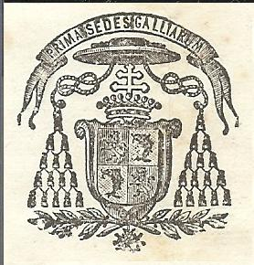 Armoiries Mgr JMA GINOULHIAC